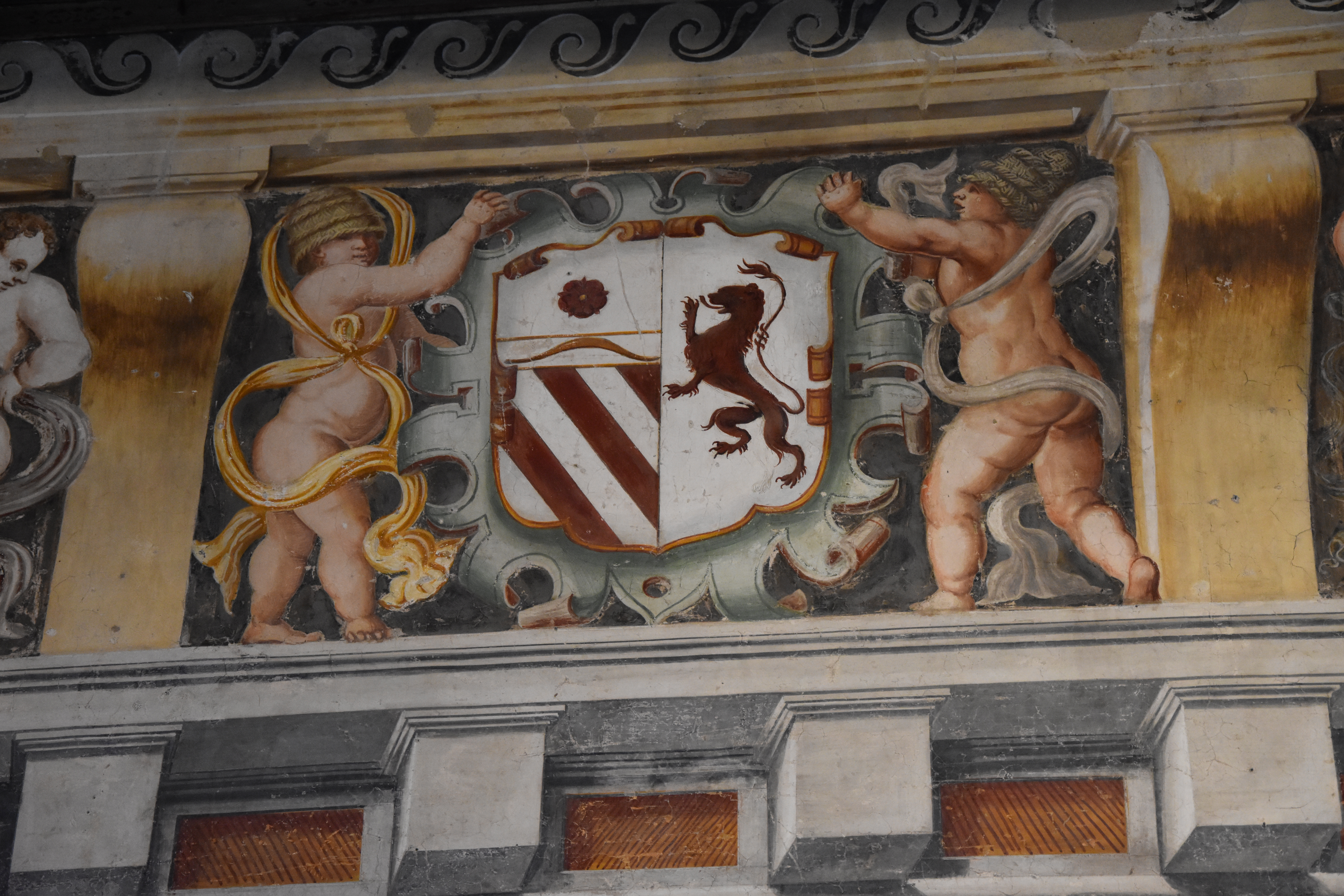 Castello di Melegnano, sala degli stemmi, particolare degli affreschi cinquecenteschi.